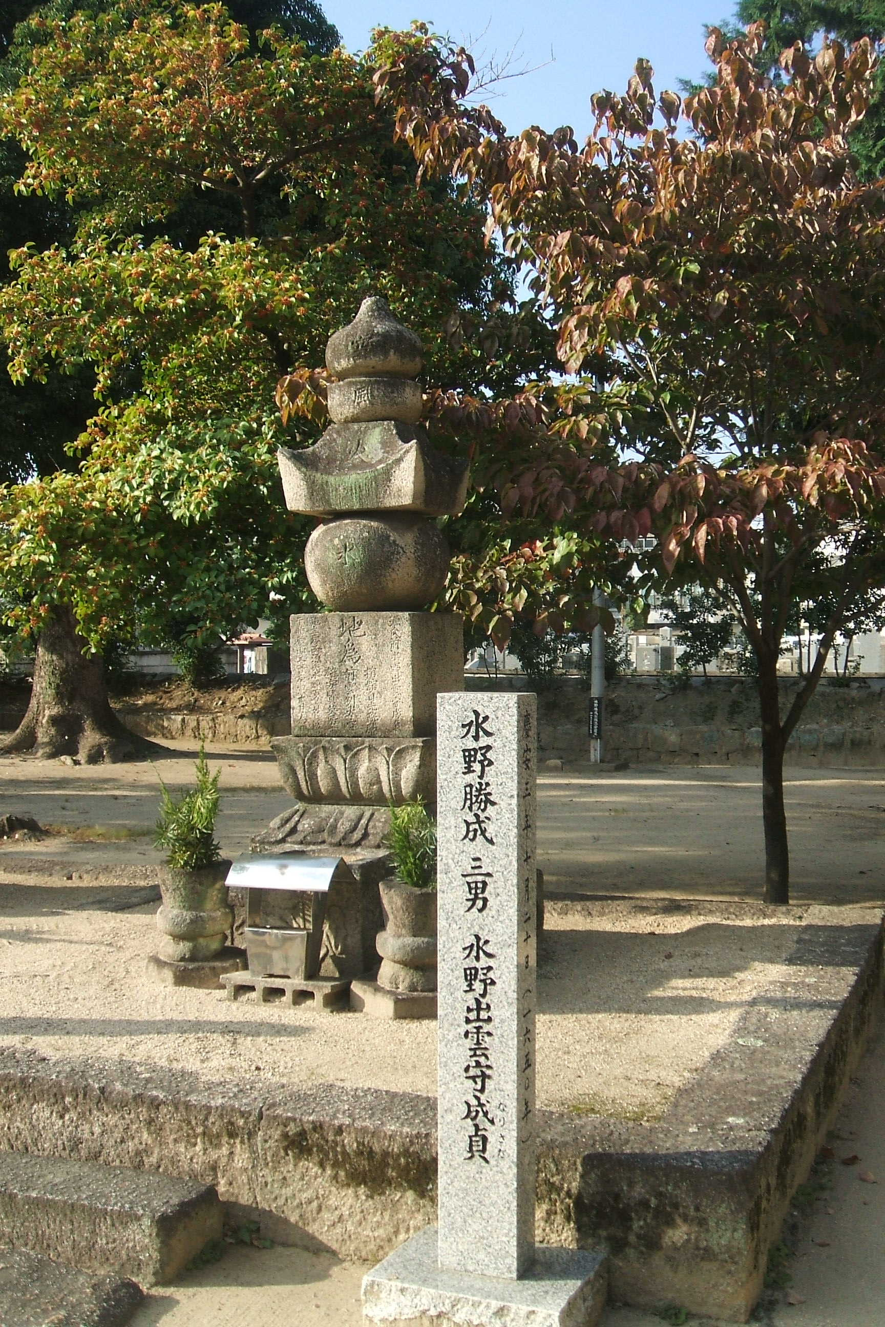 広島県福山市にある水野出雲守成貞の墓所